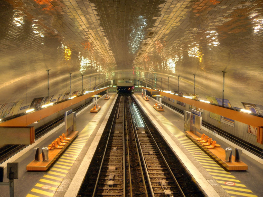 Metro de Paris ligne 8 porte de Charenton